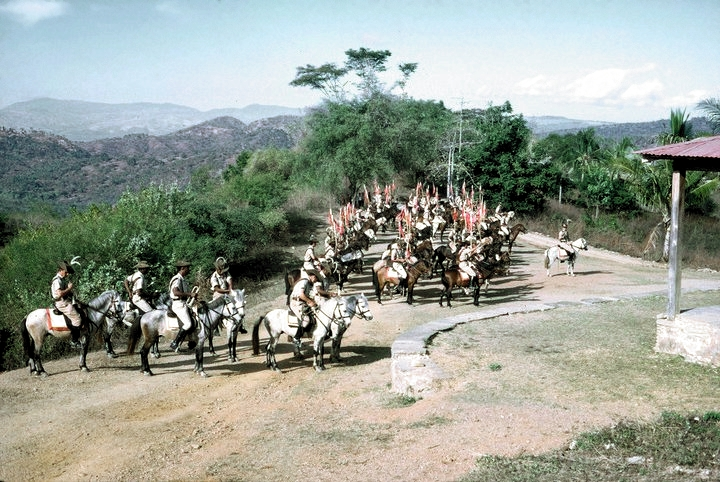 O Esquadrão a Cavalo prepara-se para partir para Huato Buicari,local da homenagem ao Alferes Francisco Duarte,o ARBIRU